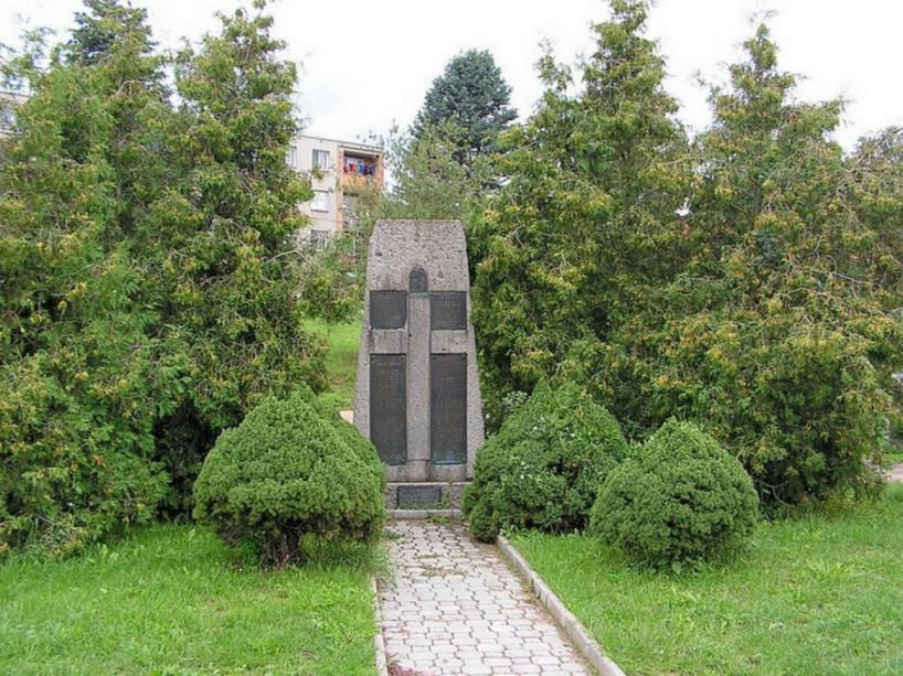 Památník padlých vojáků v 1.sv válce